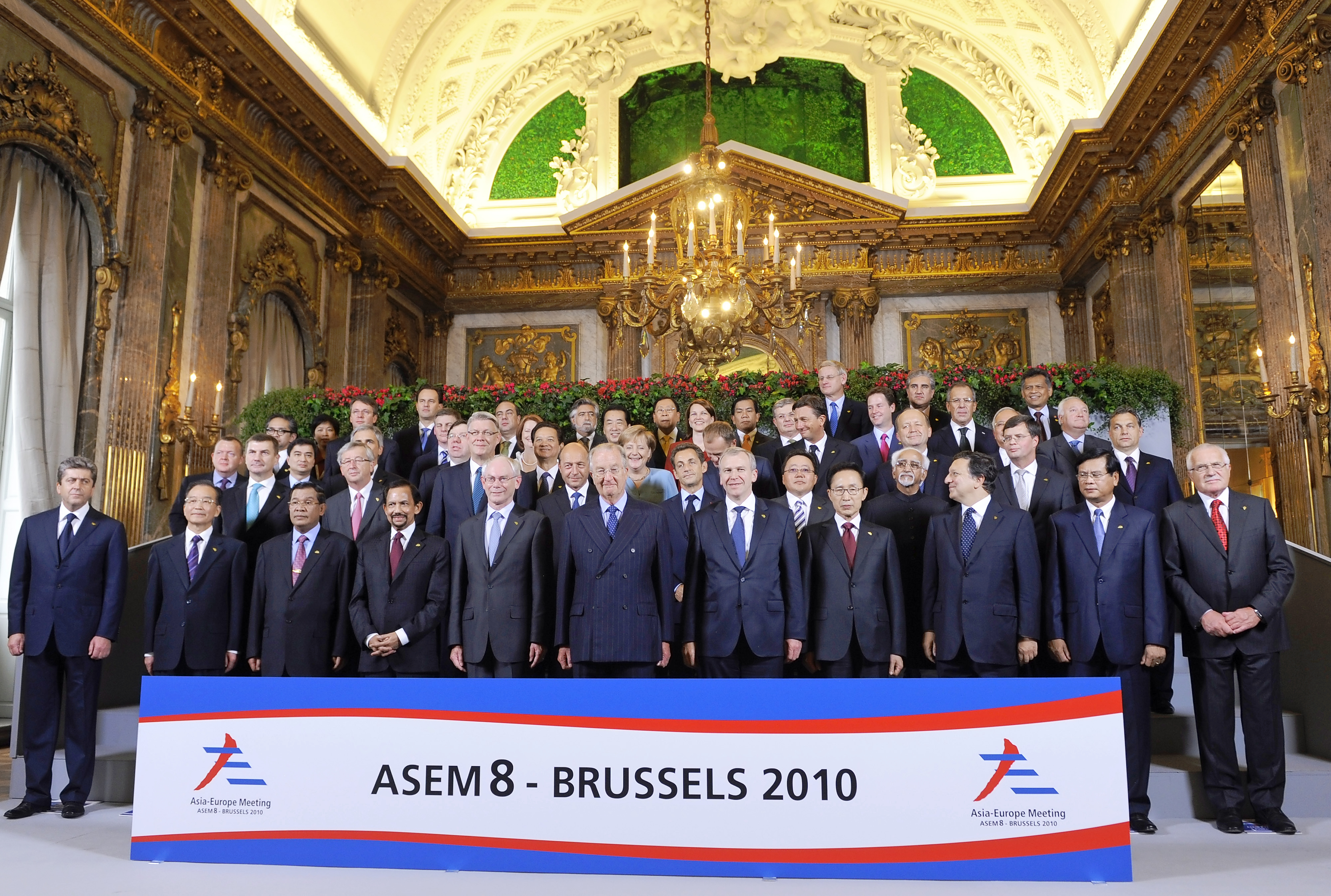 Σύνοδος Κορυφής Ευρωασιατικής Διάσκεψης-ASEM (Βρυξέλλες, 04-05.10.2010)